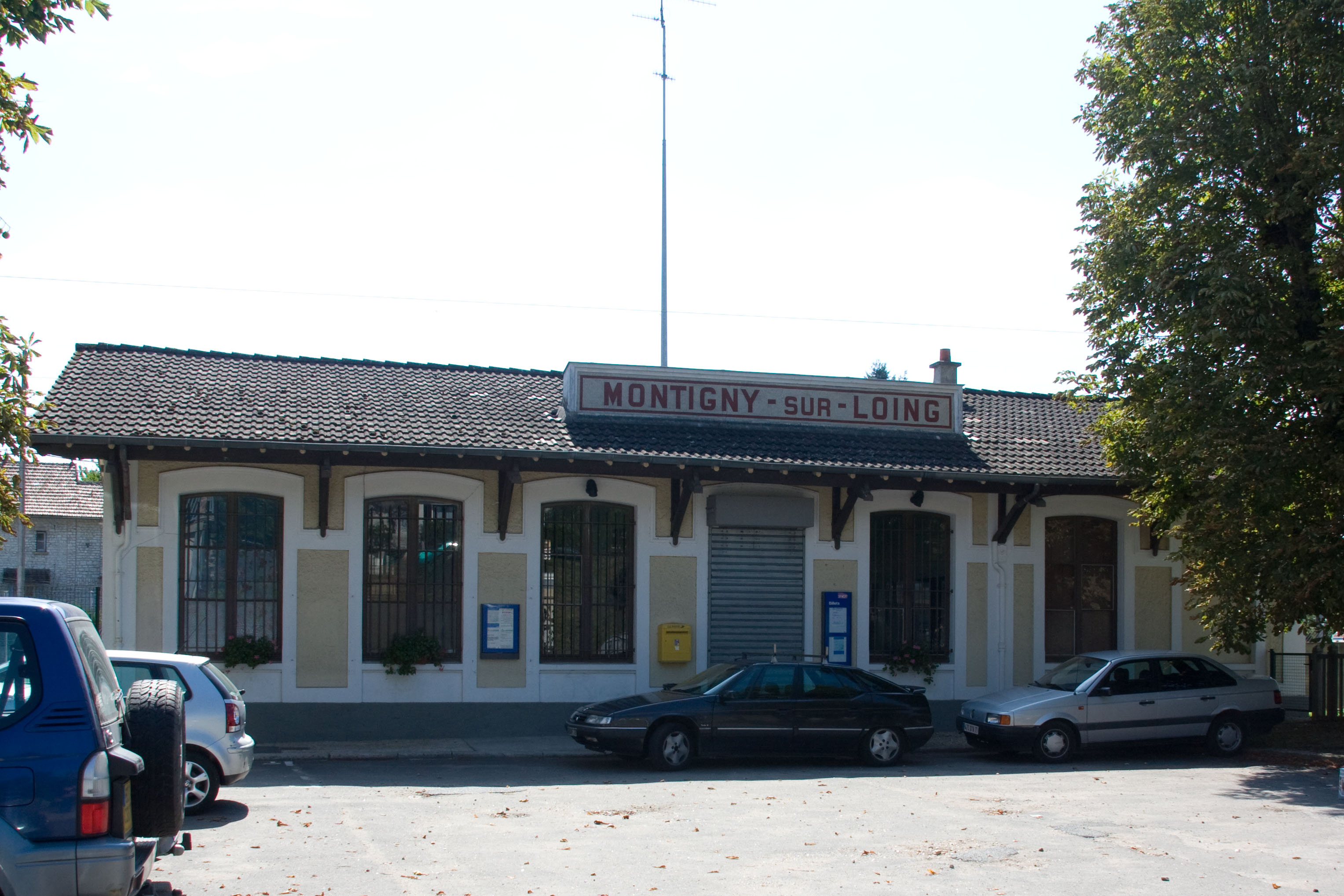 Gare de Montigny-sur-Loing. Montigny-sur-Loing, Seine-et-Marne, France.